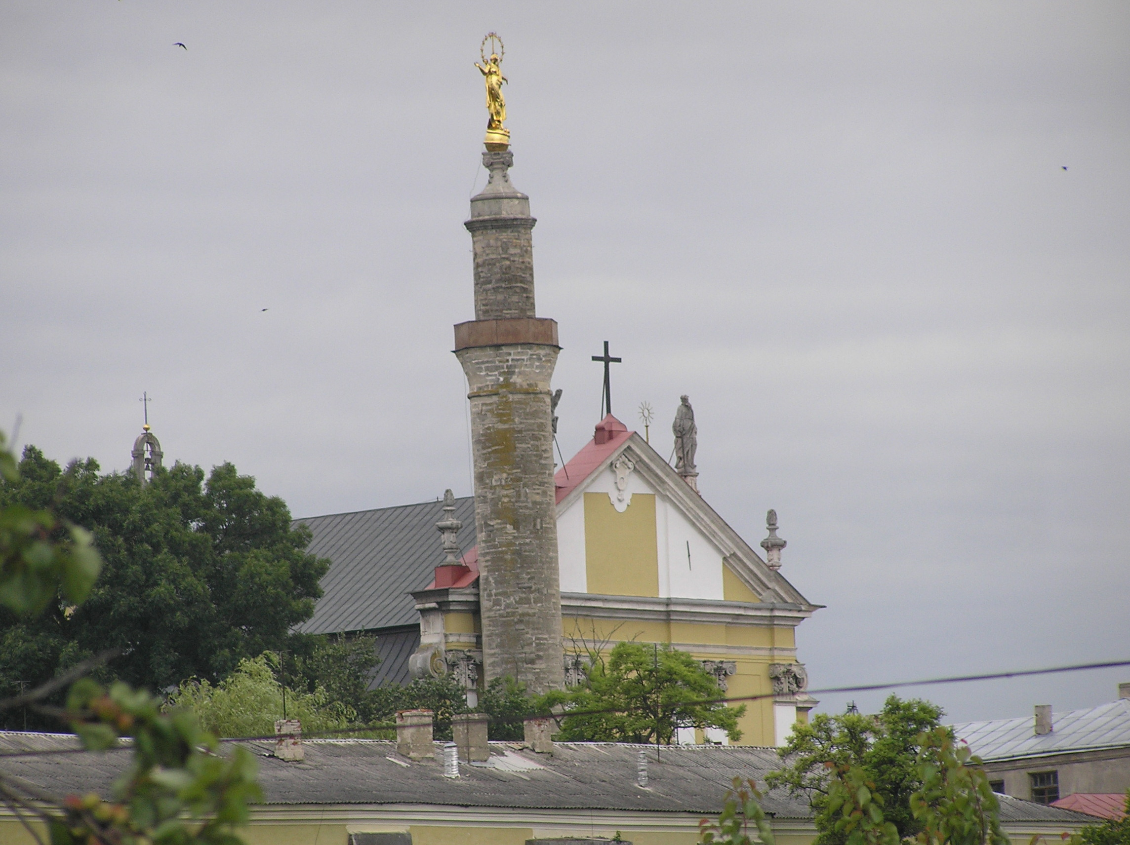 Cathedral with minarete with gold St. Mary... (Once Turks conquered the city, they did not destroy the cathdral but built the minarete. After recapturing Polish instead of pulling down the minarete, put St. Mary sculpture on the top of it)//Katedra z minaretem z Matką Boską na szczycie... (Kiedy Turcy przejęli miasto w 1672 roku, zamiast zburzyć katedrę, wybudowali przy niej minaret. Polacy zaś po odzyskaniu Kamieńca postawili na nim złotą figurę Matki Boskiej...)